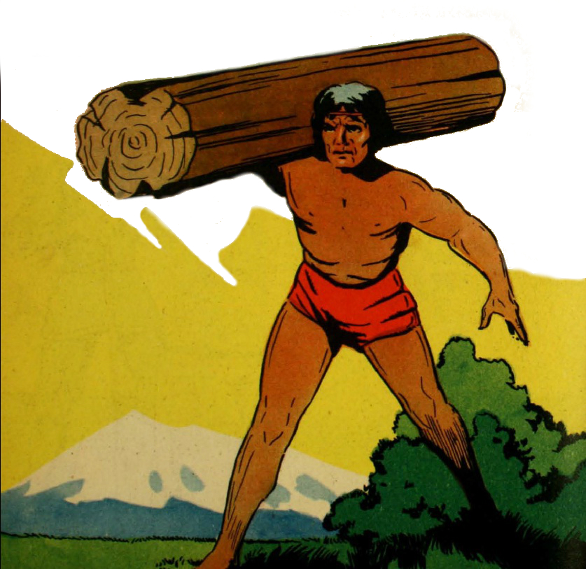 Caupolicán (del mapudungun, literalmente 'pedernal pulido', (por queupú) o 'piedra de cuarzo azul' (por Kallfülikan))2​ fue un toqui mapuche que lideró la resistencia de su pueblo contra los conquistadores españoles que invadieron Chile durante el siglo XVI.